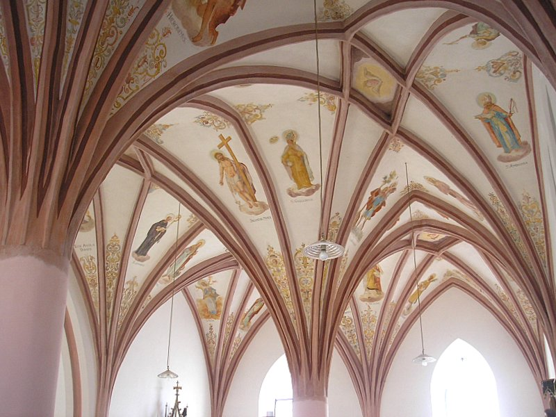 St. Leonhard (Fürstenfeldbruck, Oberbayern). Gewölbe im Langhaus. Eigene Aufnahme, Jan. 2007 / St. Leonhard (Fürstenfeldbruck, Upper Bavaria, Germany). The vaulting of the nave. Own photo, Jan. 2007